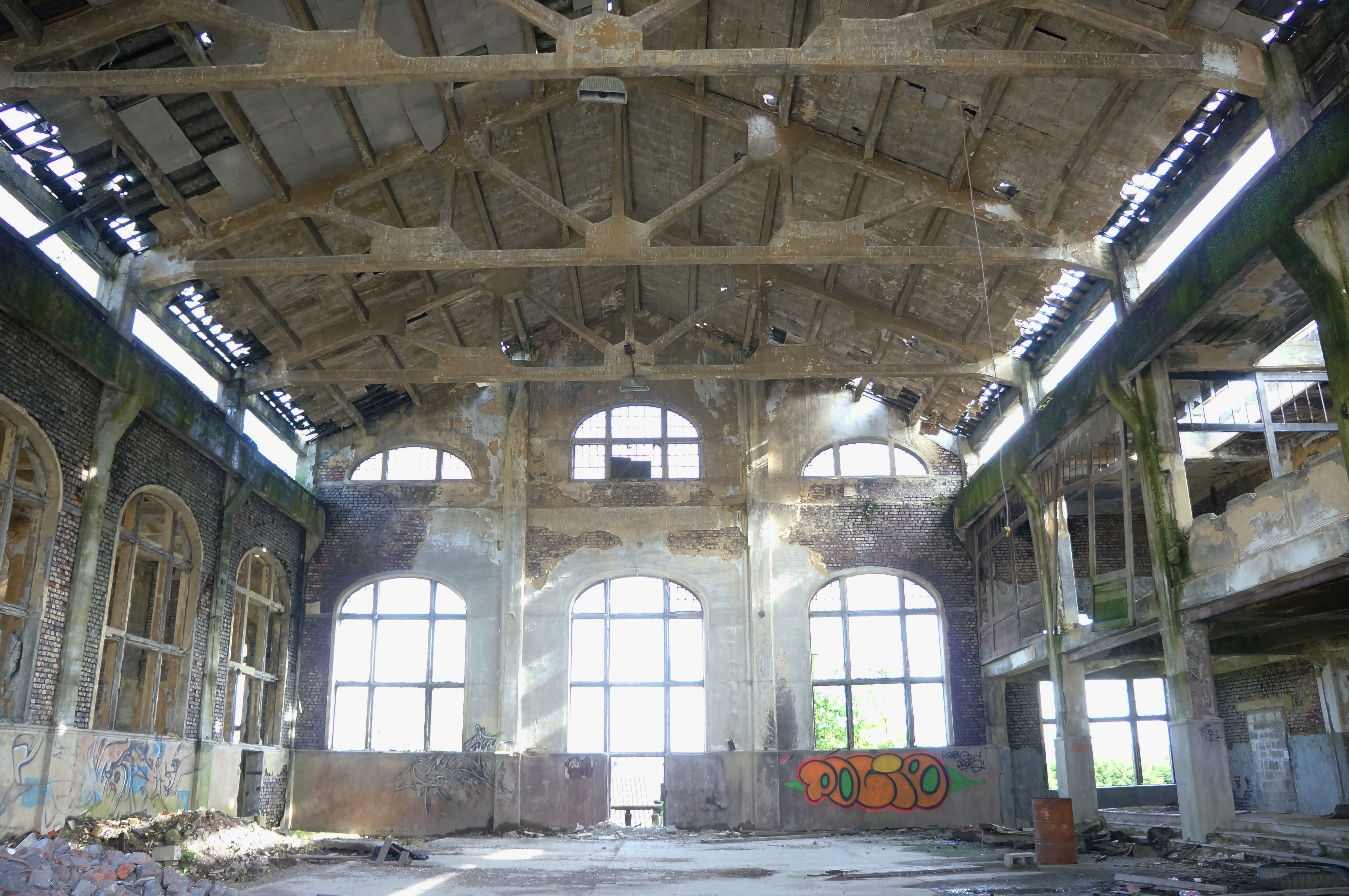 Charbonnage du Gouffre: intérieure de la salle électrique.